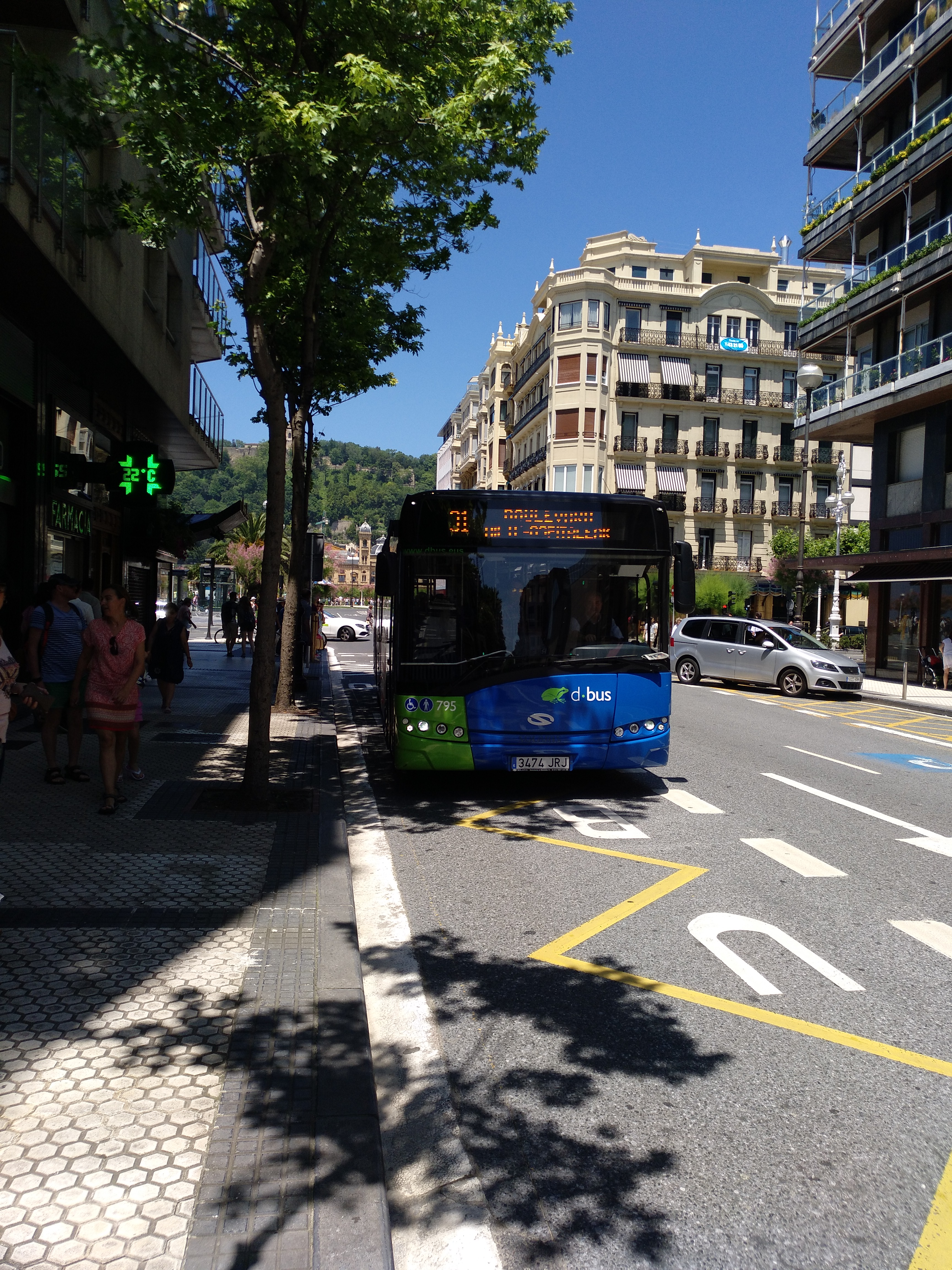 Autobús urbano (línea 31) en San Sebastián (d•bus) entrando en Urbieta hacia hospitales